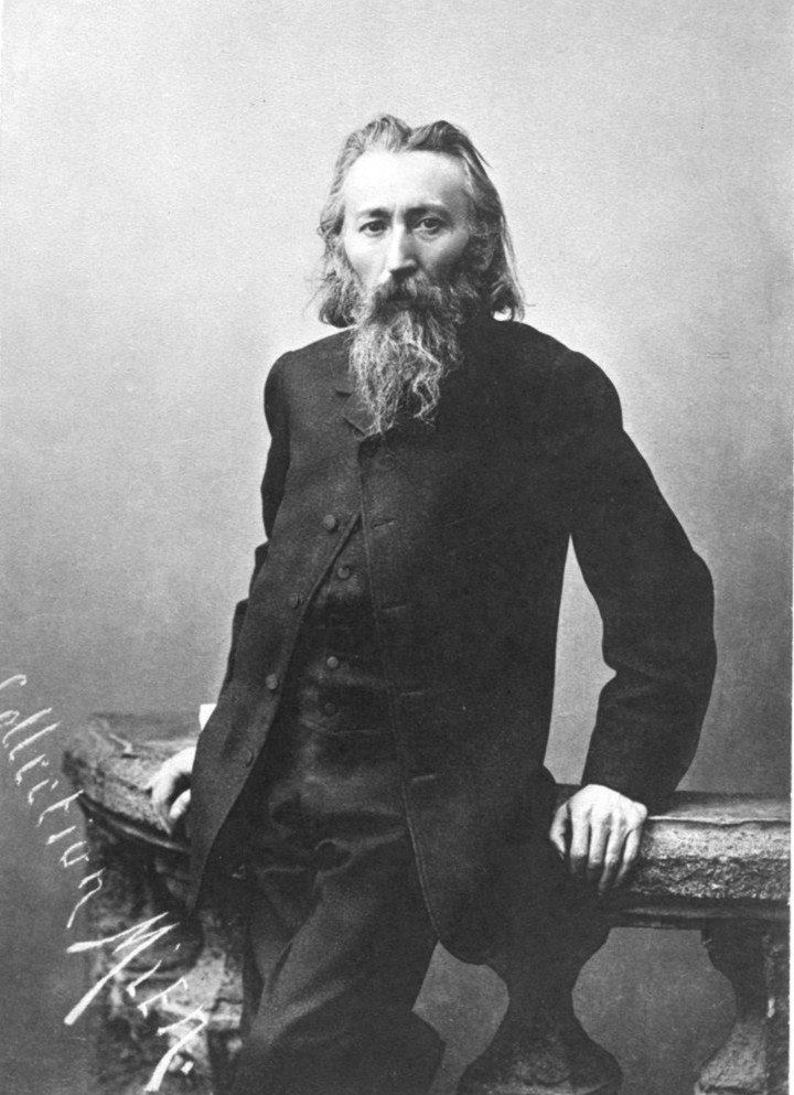 Jan Matejko